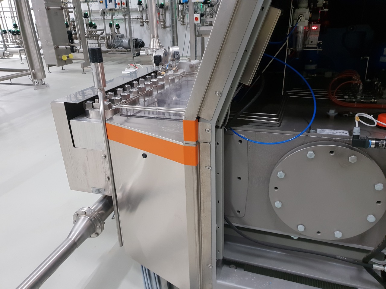 Vue latérale d'un homogénéisateur